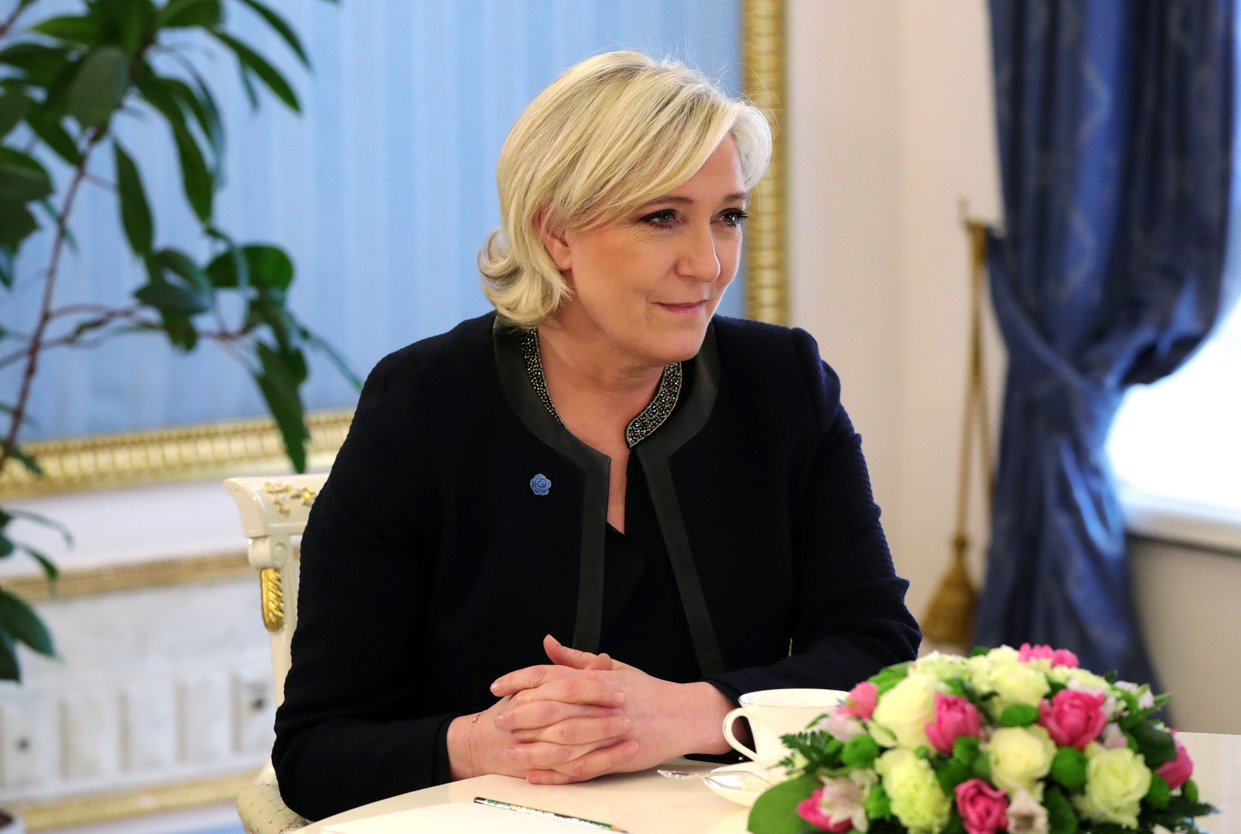 Лидер политической партии Франции «Национальный фронт» Марин Ле Пен во время встречи с Президентом России Владимиром Путиным